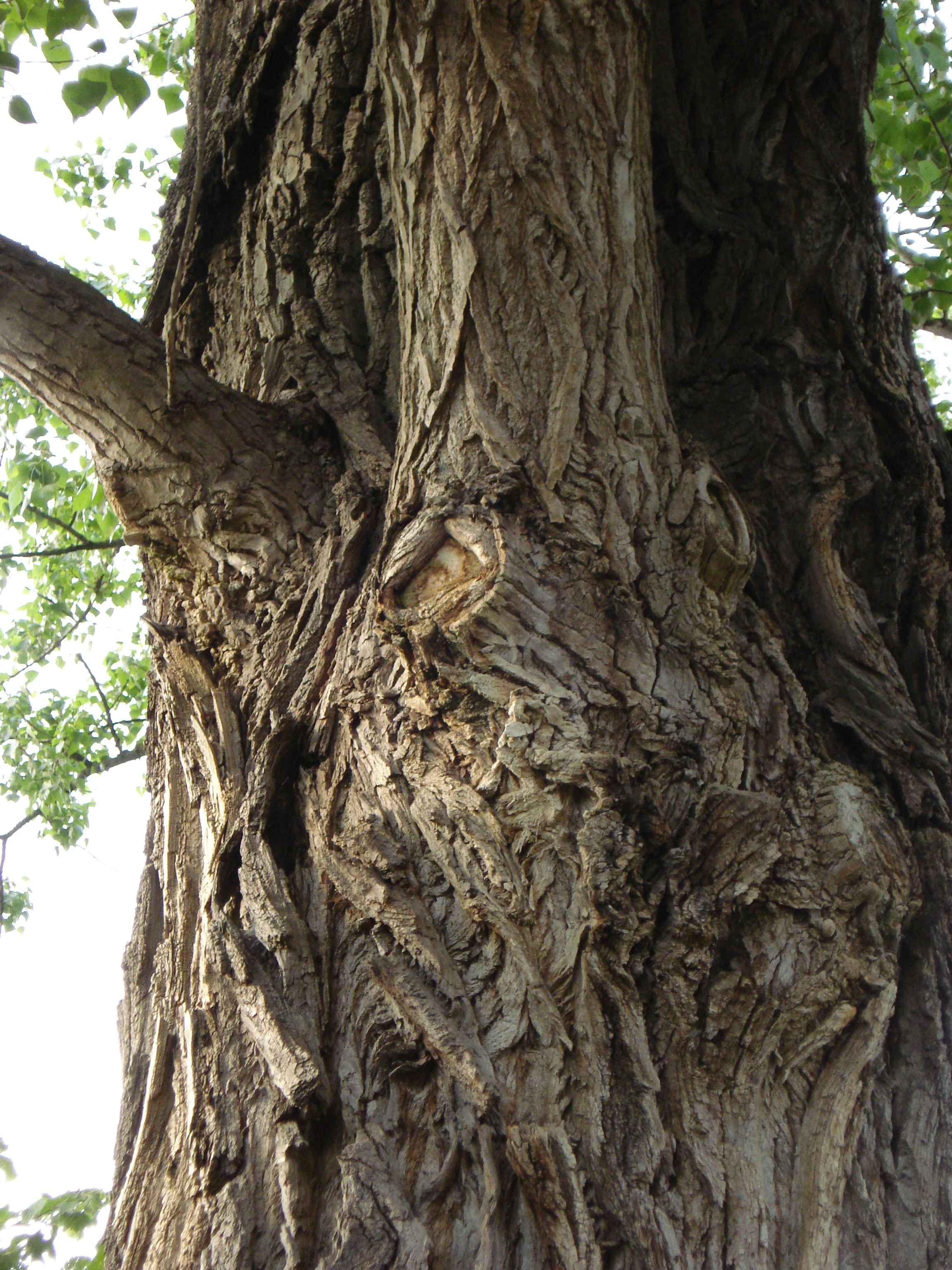 Borke einer alten Schwarzpappel in Dreieich, Deutschland